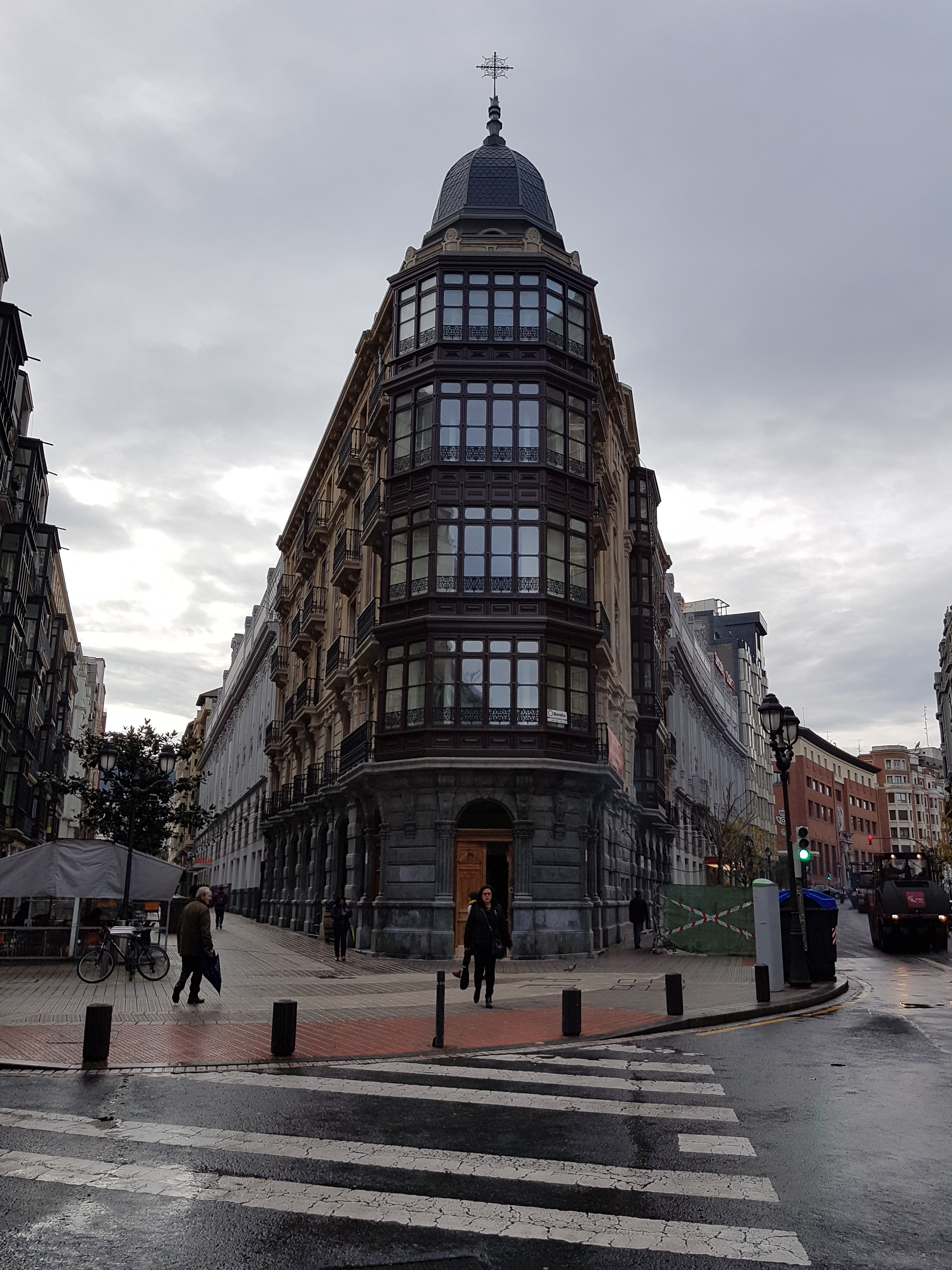 Calle Lutxana esquina Alameda de Urquijo, en Bilbao